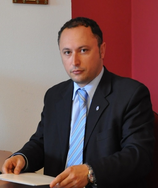 Veton Latifi Profesori Veton Latifi është një nga teoricientët kryesorë të marrëdhënieve ndërkombëtare dhe shkencave politike në Ballkan.